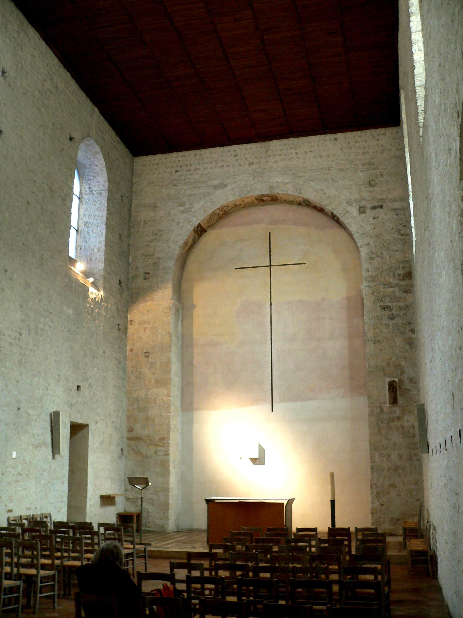 La chapelle Saint-Symphorien reconstruite au XIe siècle sur l'emplacement de la chapelle primitive.